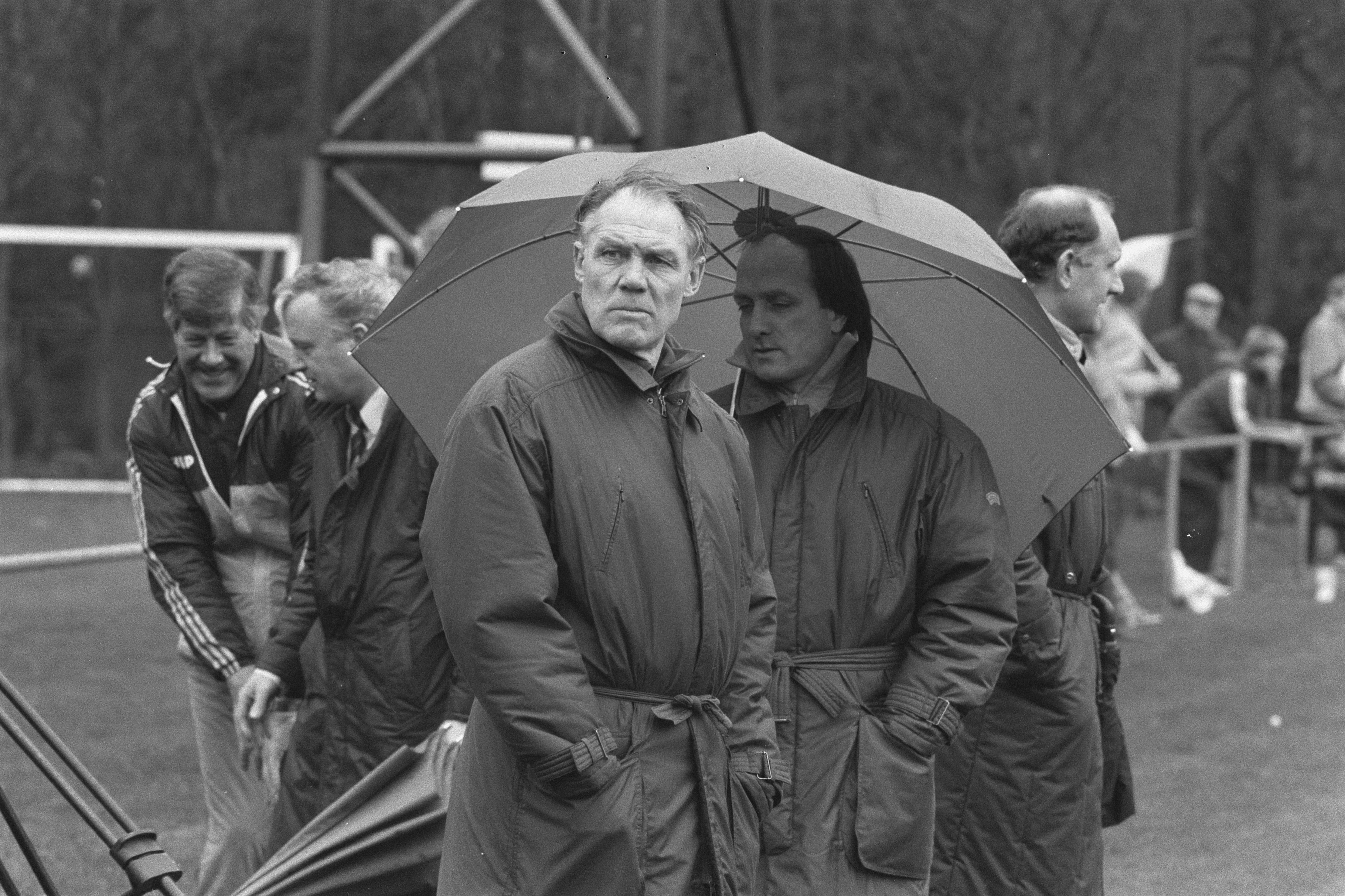 Collectie / Archief : Fotocollectie Anefo Reportage / Serie : [ onbekend ] Beschrijving : Nederlands elftal oefent in Zeist voor wedstrijd tegen Cyprus; bondscoach Rinus Michels en assistent Dick Advocaat Datum : 17 december 1986 Locatie : Utrecht, Zeist Trefwoorden : sport, trainers, voetbal Persoonsnaam : Advocaat, Dick, Michels, Rinus Fotograaf : Bogaerts, Rob / Anefo, [onbekend] Auteursrechthebbende : Nationaal Archief Materiaalsoort : Negatief (zwart/wit) Nummer archiefinventaris : bekijk toegang 2.24.01.05 Bestanddeelnummer : 933-8448